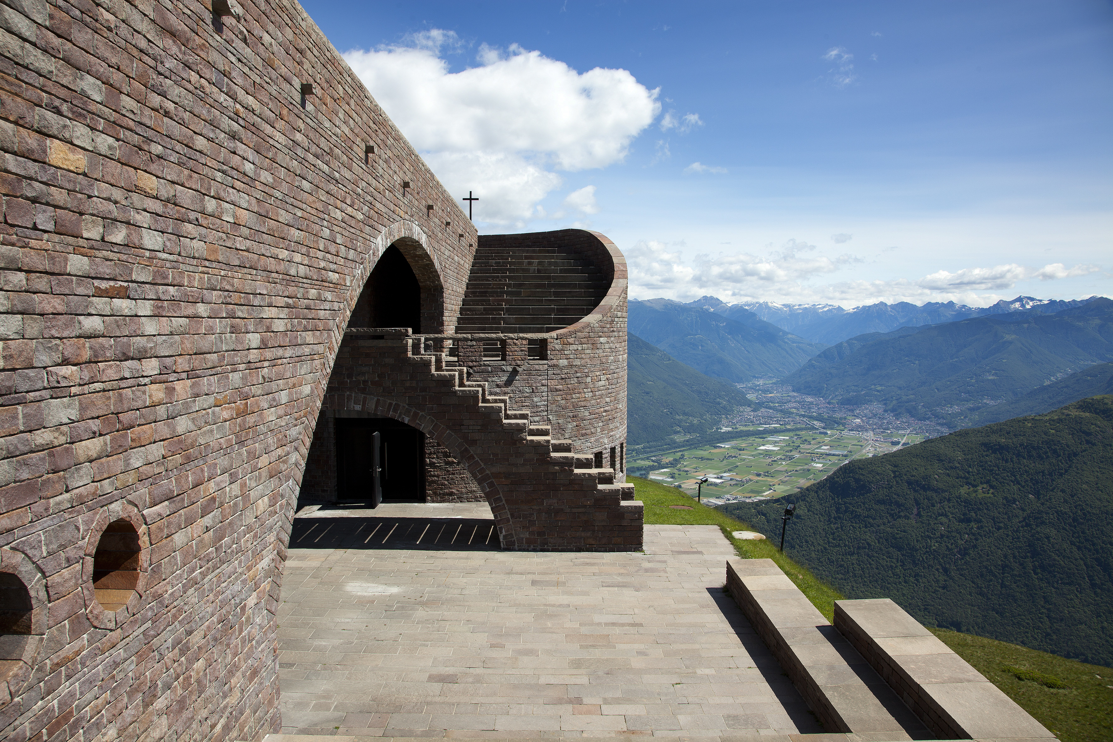 Kirche Santa Maria degli Angeli von Mario Botta mit Mahlereien von Enzo Cucchi auf dem Monte Tamaro